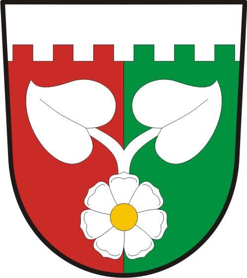 Hradec